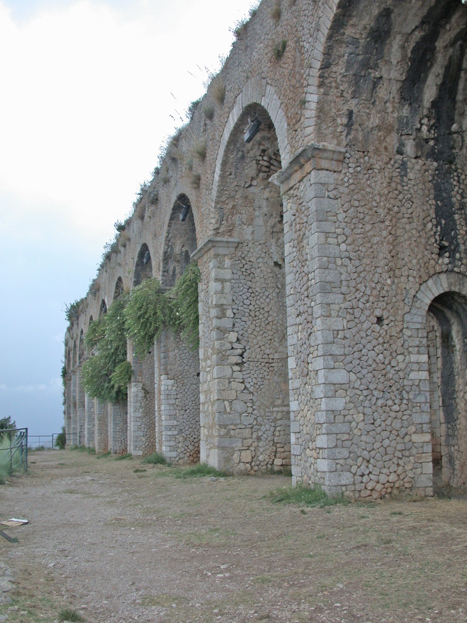 Terracina (provincia di Latina, Lazio, Italia), tempio di Giove Anxur, facciata della terrazza su cui sorgeva il tempio.